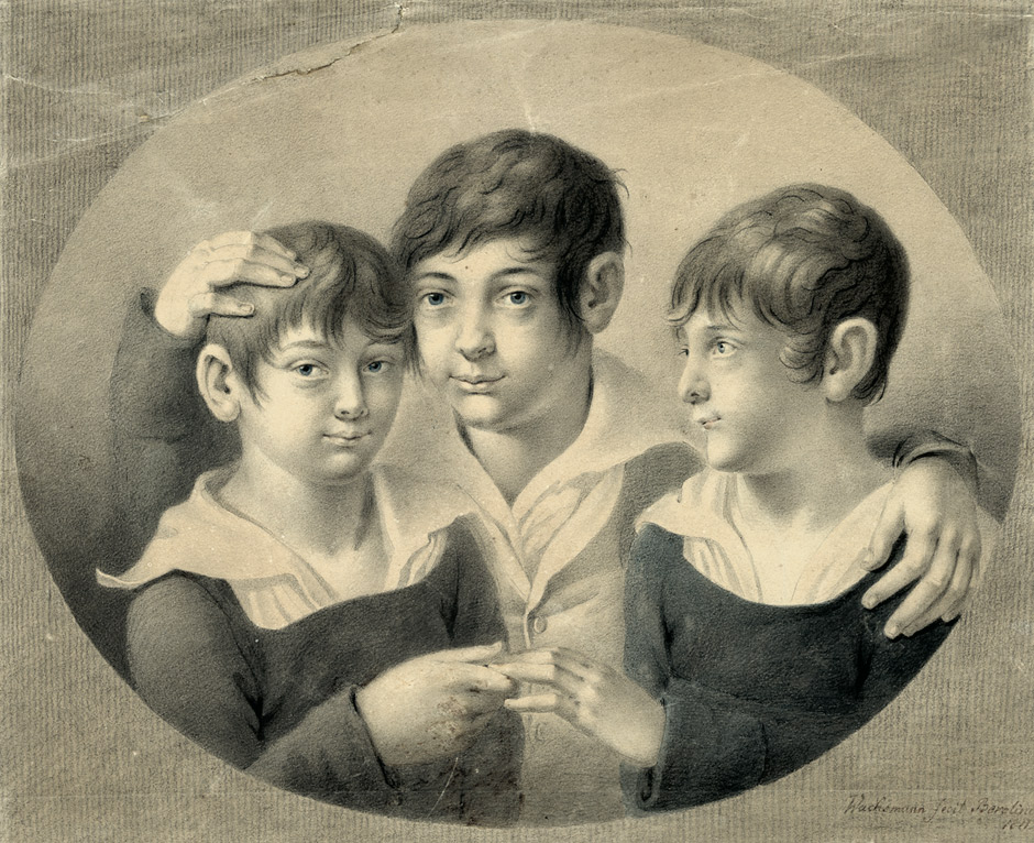 Freundschaftsbildnis dreier Knaben. Schwarze Kreide, blau laviert, weiß gehöht. 37 x 44,7 cm. Unten rechts signiert und datiert "Wachsmann fecit Berolino 1811".